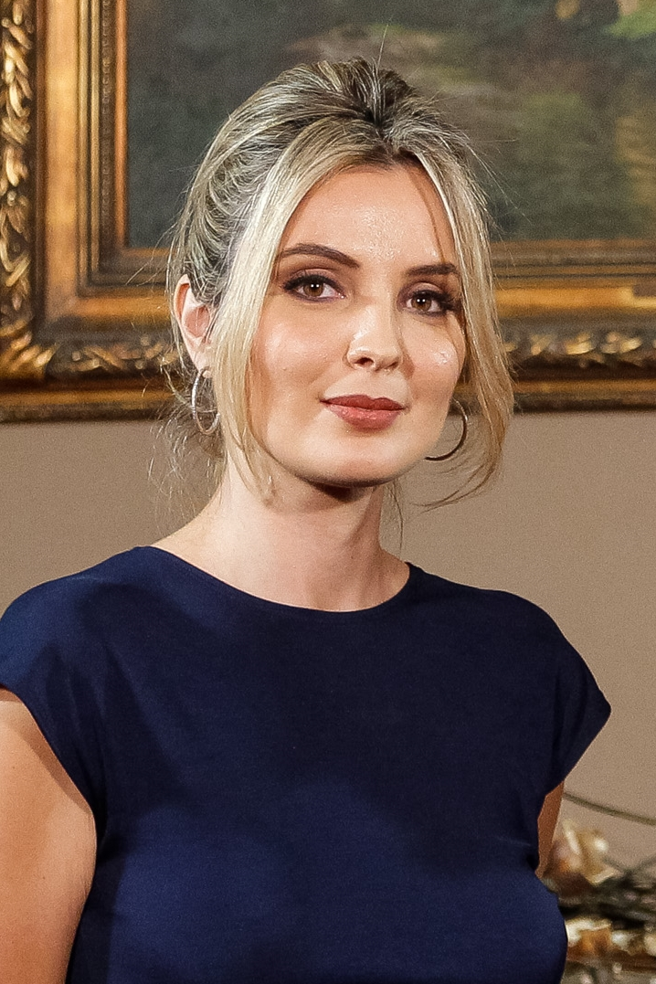 Marcela Temer em setembro de 2016.